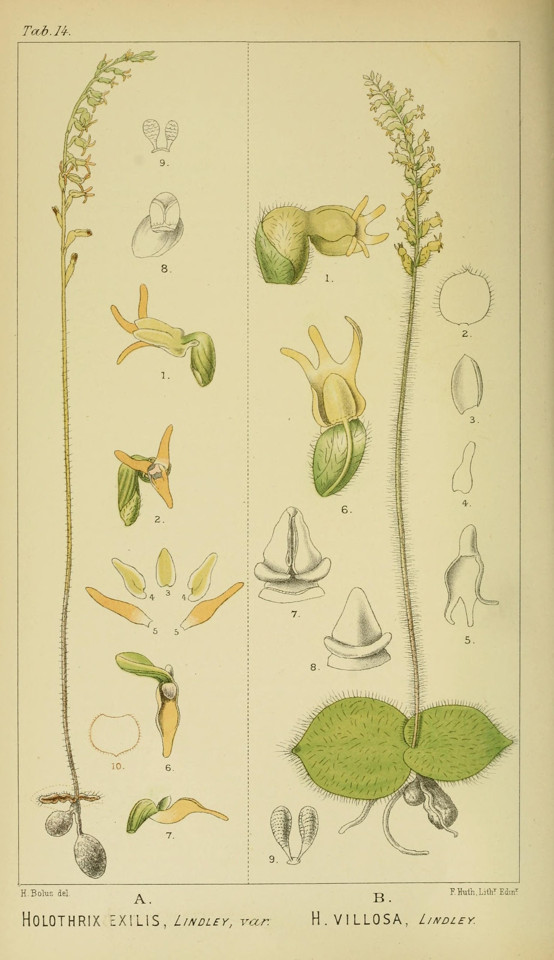 Tayb.J4-. H Bolus del F Until, LHHEdin^ HOLOTHRIX VA\l\S, L/NDLEY, var. H.VILLOSA, I/zvoley.